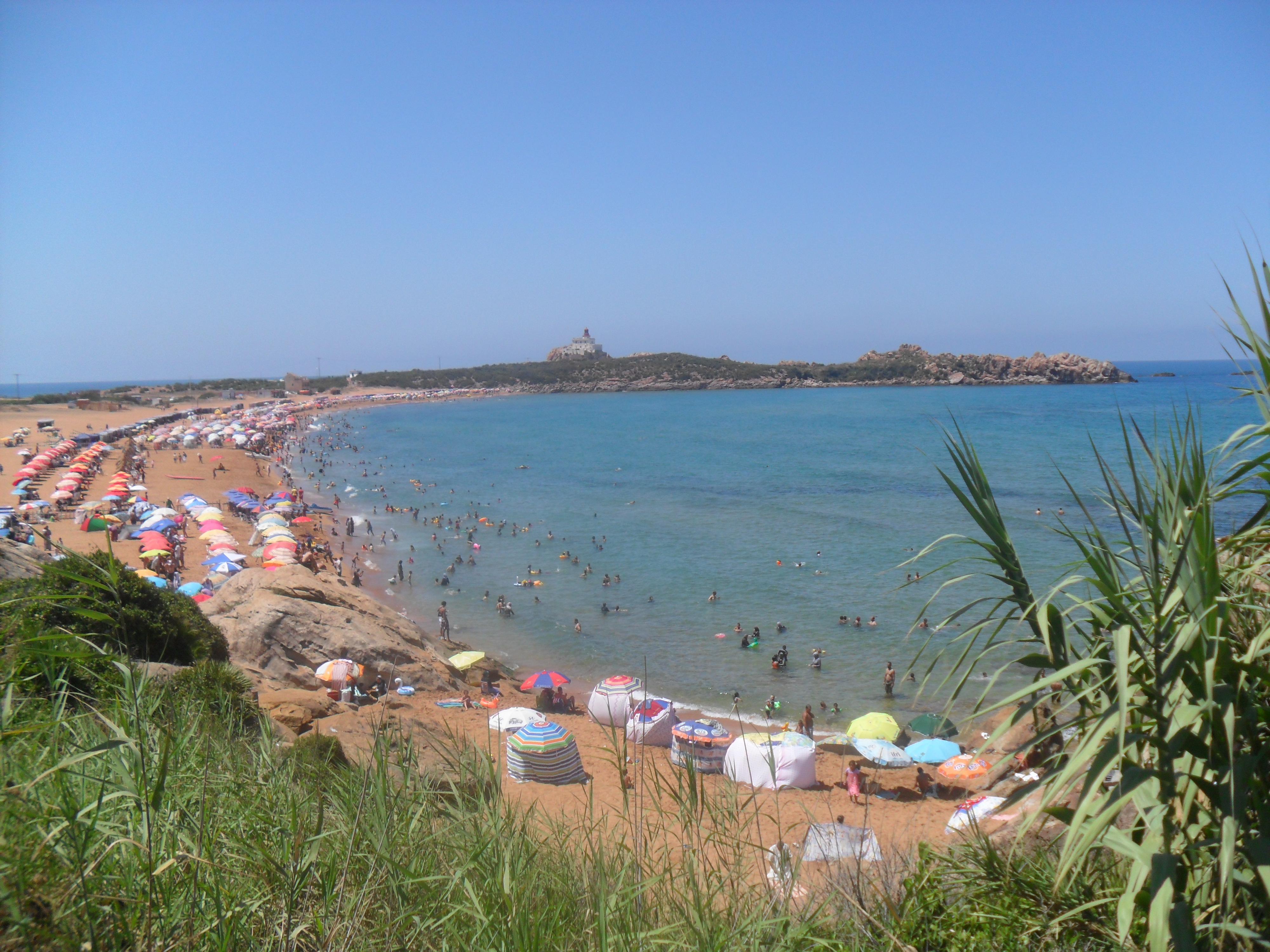 Le Grande Phare, Jijel (Algérie)